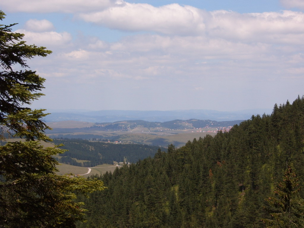 Поглед на Рибницу са Успињаче према Торнику. Слику снимио Kostas85.